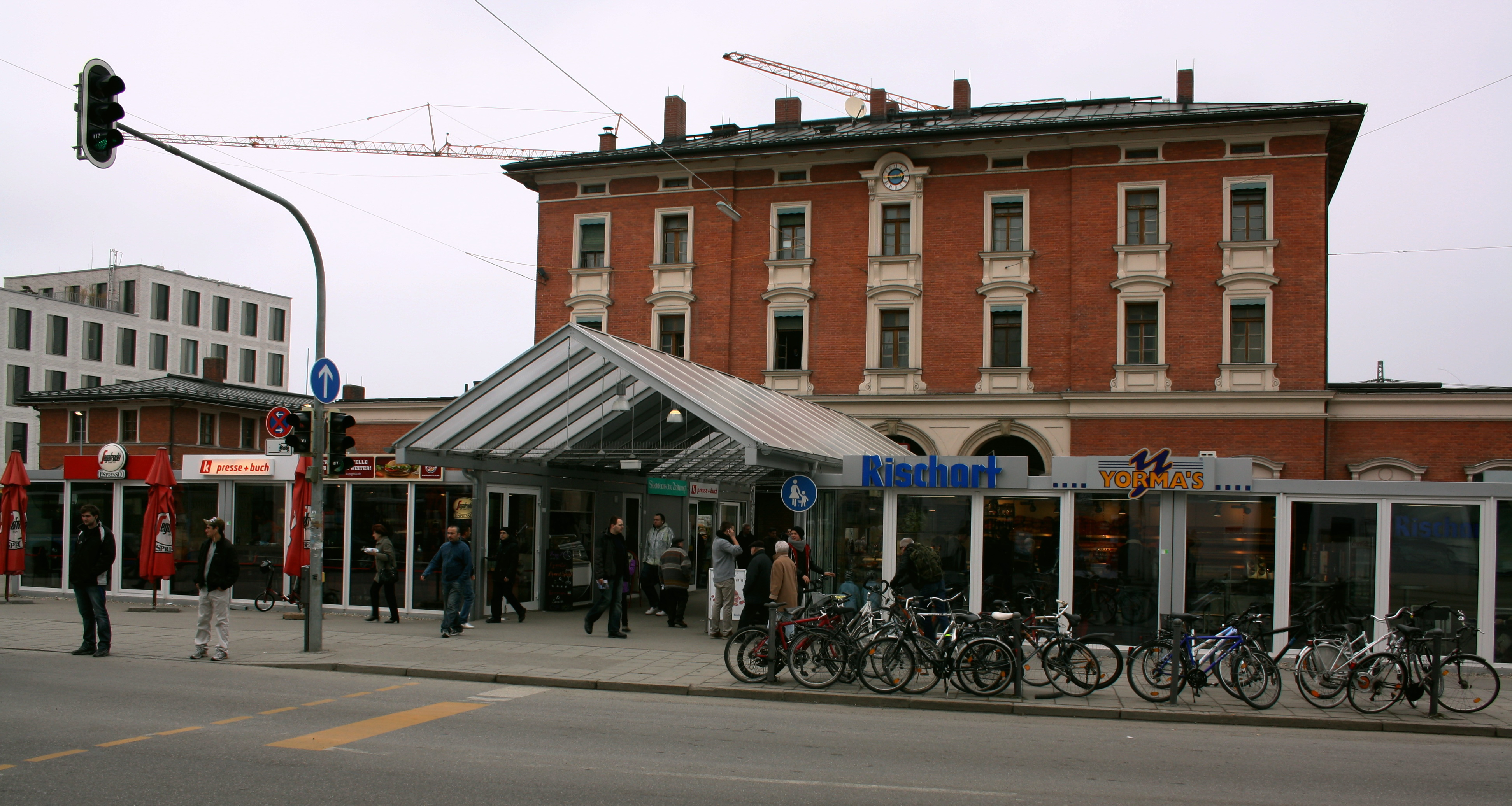 Platz vor dem Eingang des Bahnhofes München Pasing. Davor die Konditorei und Bäckerei Richard und eine Filiale der Firma Yormas